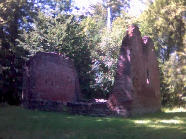 Leisenberger Kirchruine